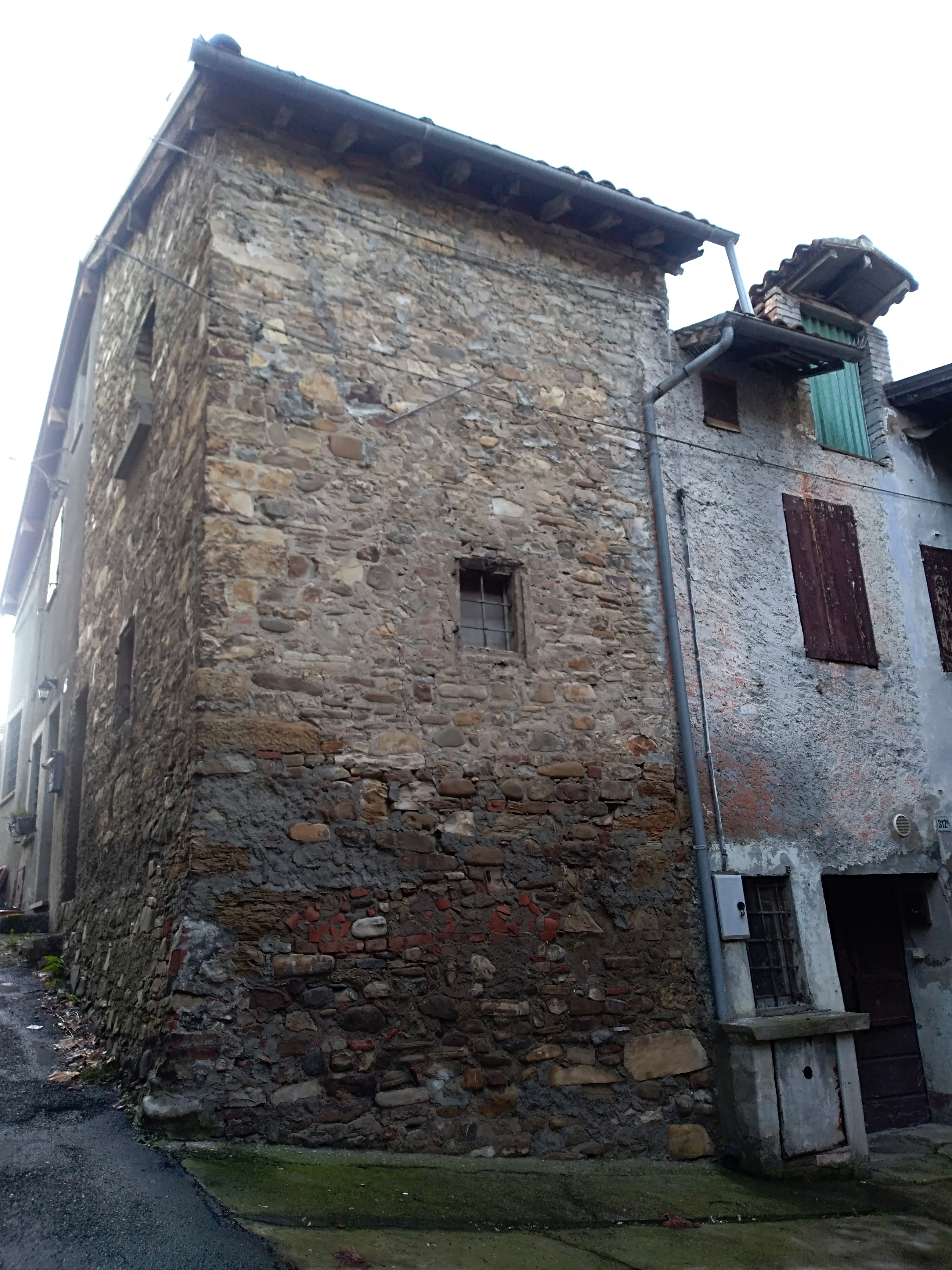 Borgo quattrocentesco